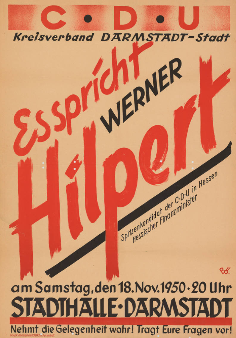 CDU Kreisverband Darmstadt-Stadt Es spricht Werner Hilpert Spitzenkandidat der CDU in Hessen Hessischer Finanzminister ... Nehmt die Gelegenheit wahr! Tragt Eure Fragen vor! Plakatart: Ankündigungsplakat Auftraggeber: KV Darmstadt-Stadt Drucker_Druckart_Druckort: Kunstanstalt Börsig, Darmstadt, Signet "Bö" Objekt-Signatur: 10-007 : 56 Bestand: Landtagswahlplakate Hessen (10-007) GliederungBestand10-18: Landtagswahlplakate Hessen (10-007) » CDU Lizenz: KAS/ACDP 10-007 : 56 CC-BY-SA 3.0 DE